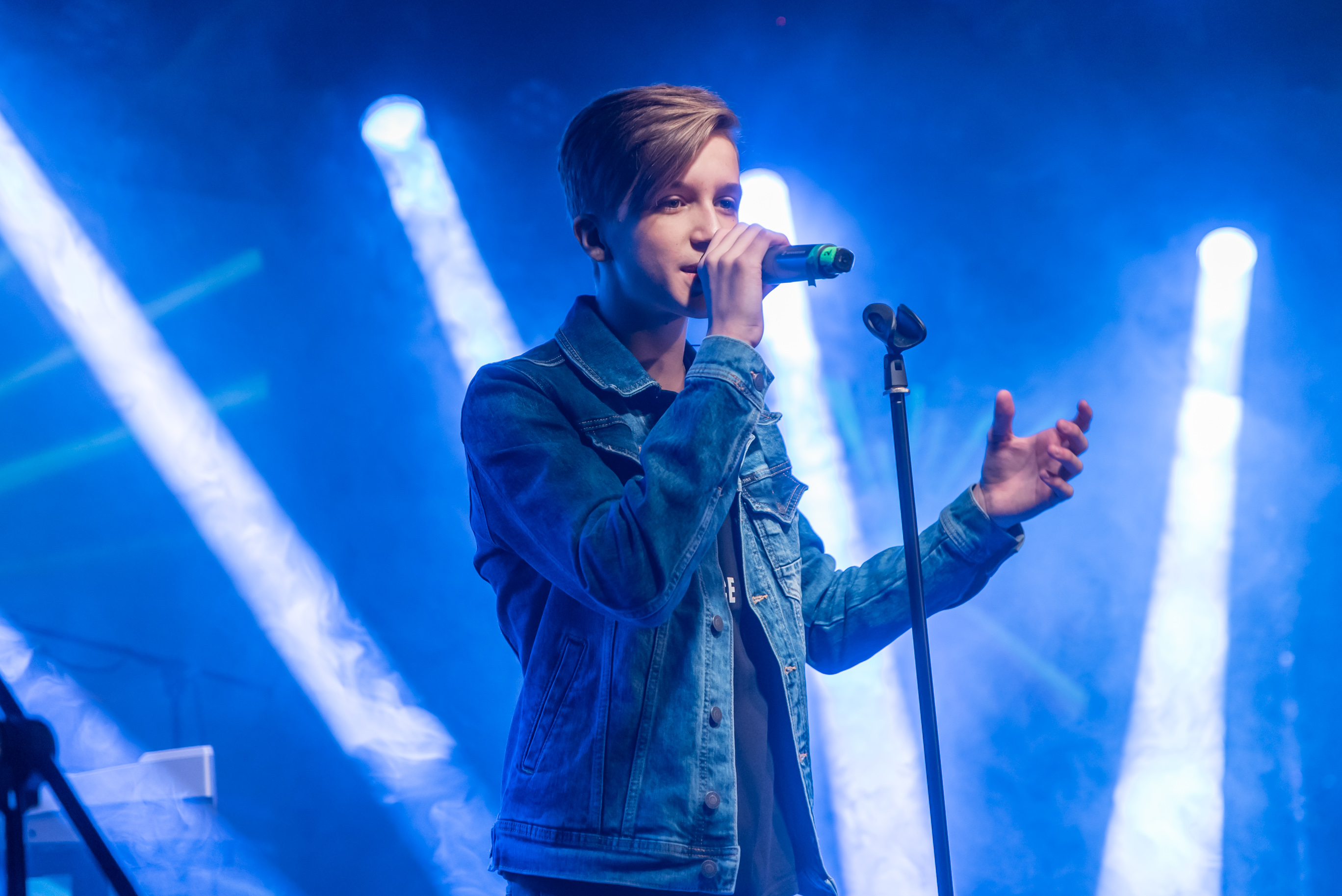 Миша Смирнов на сольном концерте в Москве в клубе «16 тонн» 11 ноября 2018 года